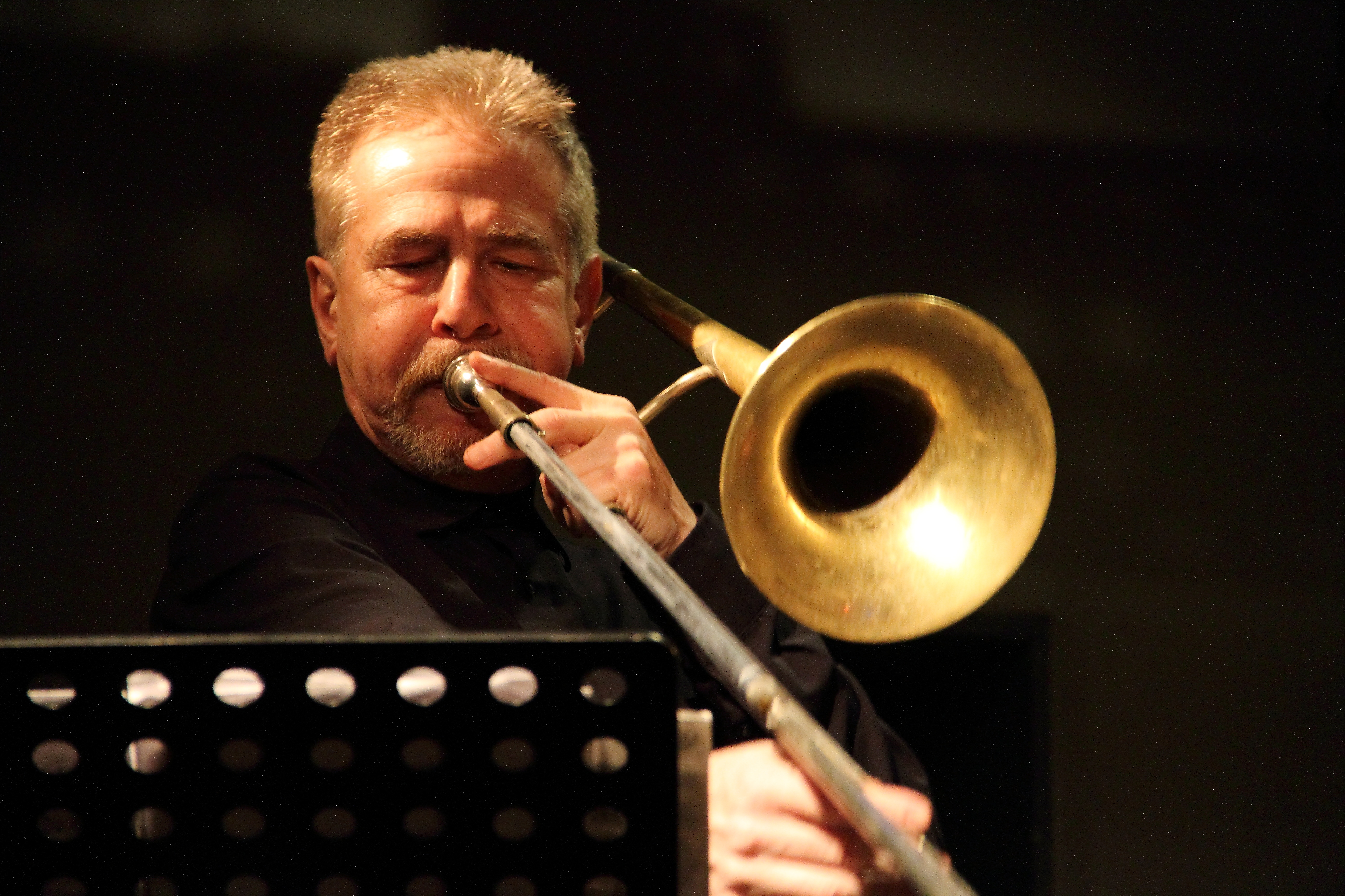 Konzert von Ullmann/Swell´s Chicago Plan im Club W71 in Weikersheim. Chicago Plan sind: Gebhard Ullmann (sax, bcl), Steve Swell (tromb), Fred Lonberg-Holm (cello, electr) und Michael Zerang (dr).